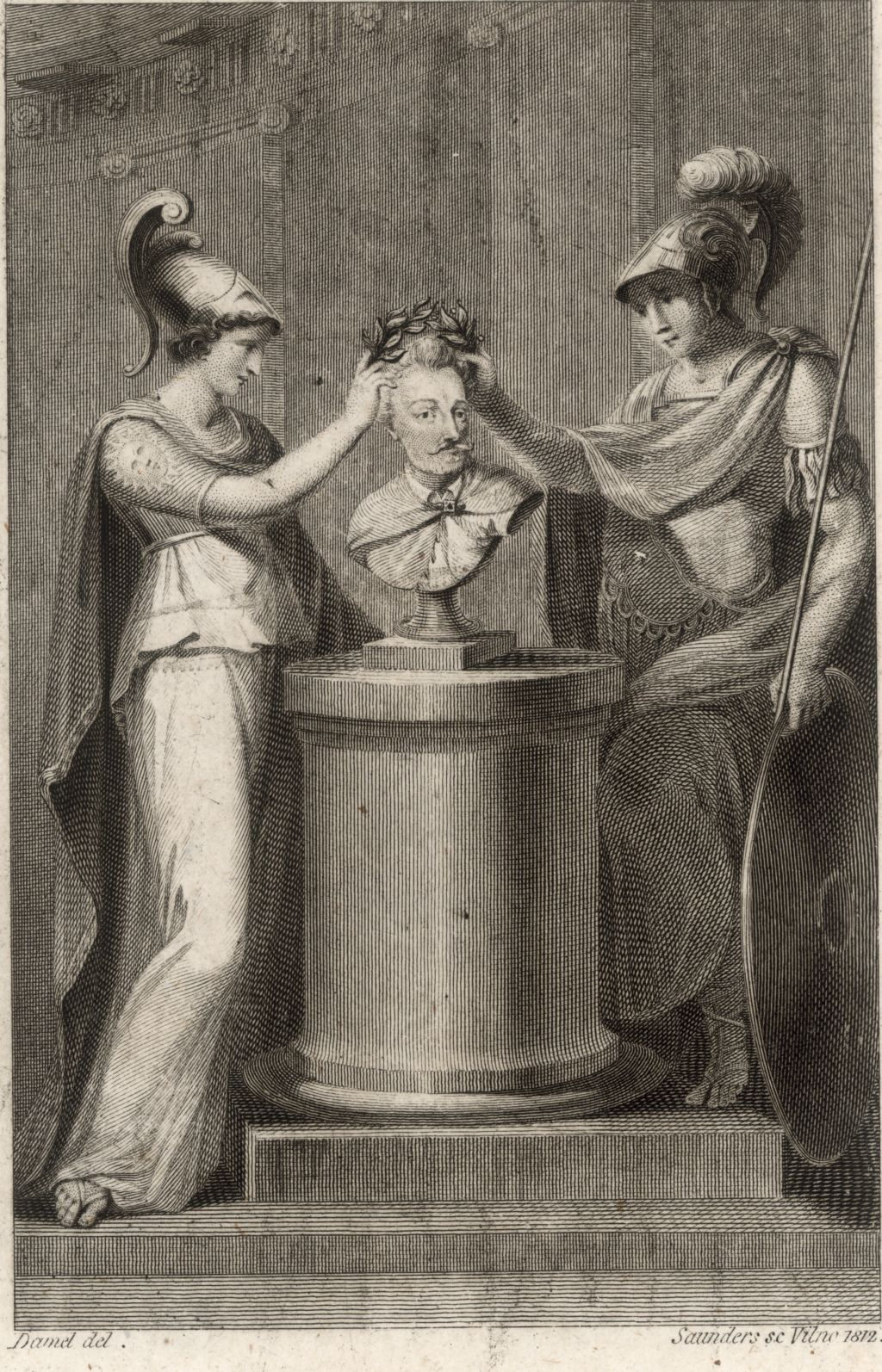 Mars and Minerva Crowning the Bust of Hetman Jan Zamoyski